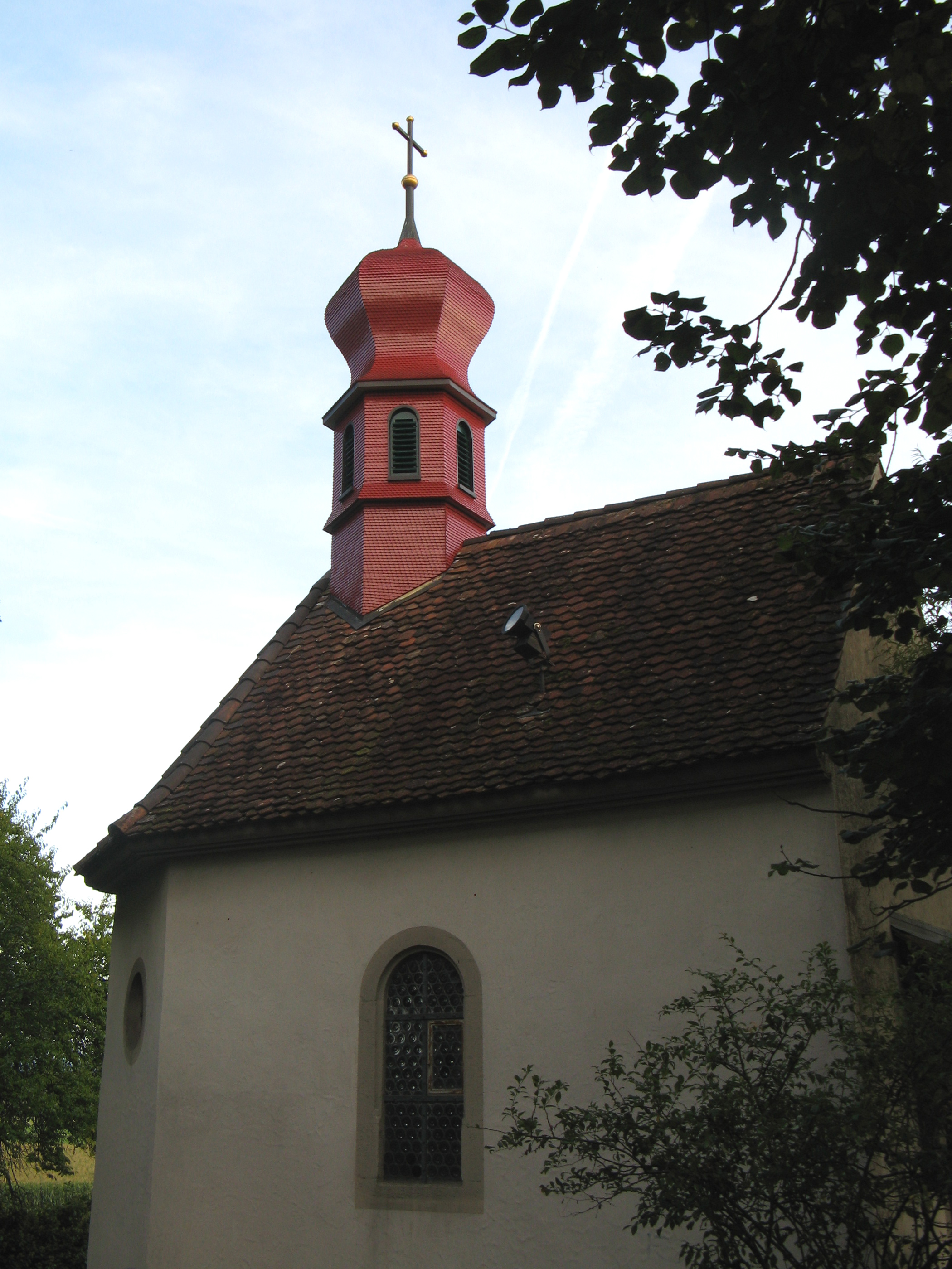 Odilokapelle (ehemaliges Beinhaus) bei der Alten Kirche in Boswil